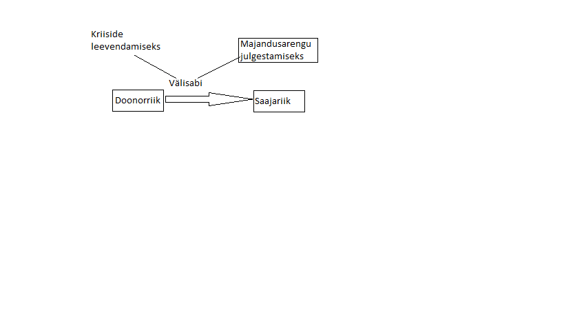 Välisabi